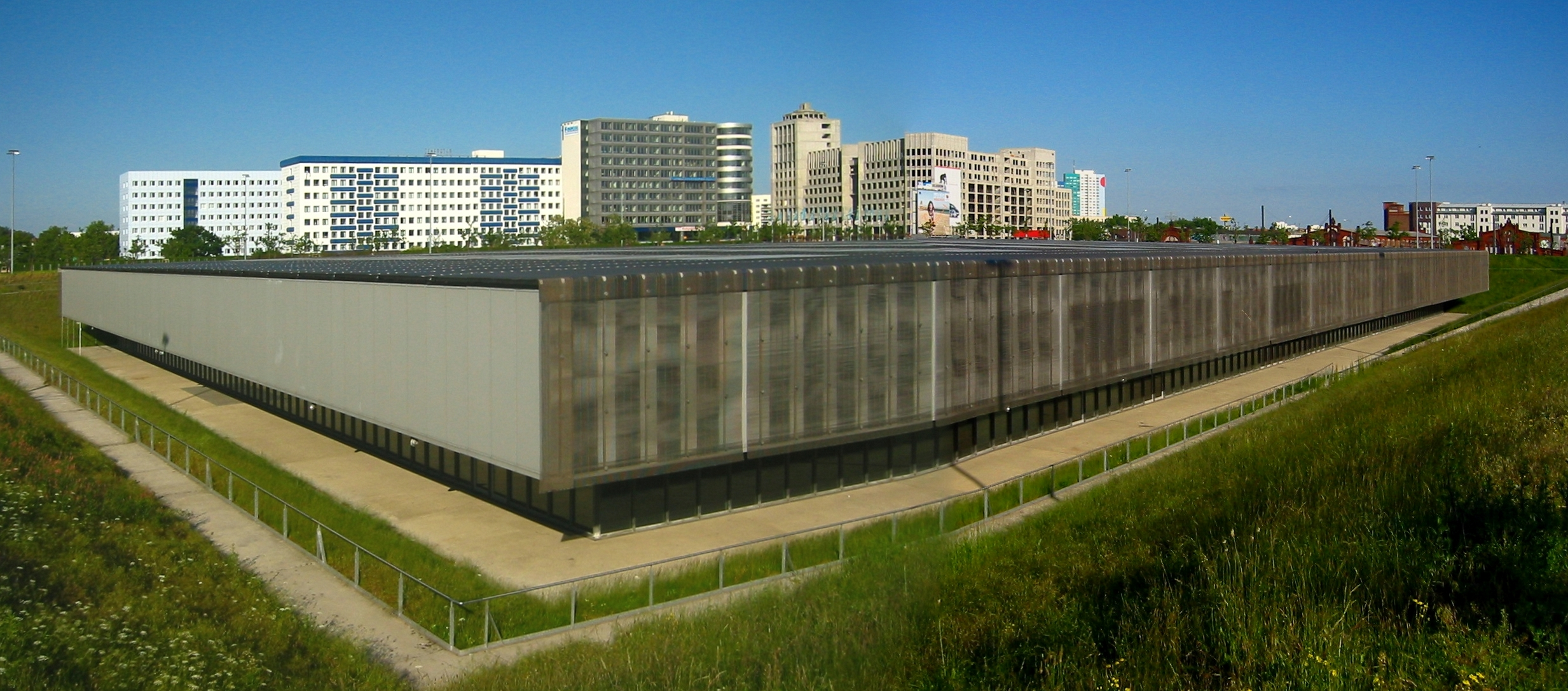 Velodrom Berlin - Blick auf die Schwimmhalle